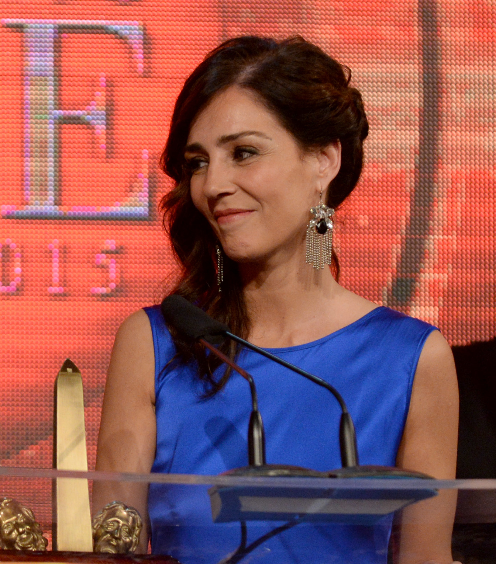 Diego Peretti y Paola Krum en la entrega de los Premios ACE en 2015